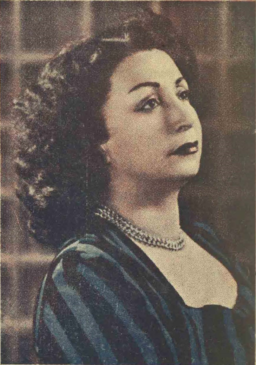 روحبخش، روی جلد شمارهٔ دوم مجلهٔ موزیک ایران